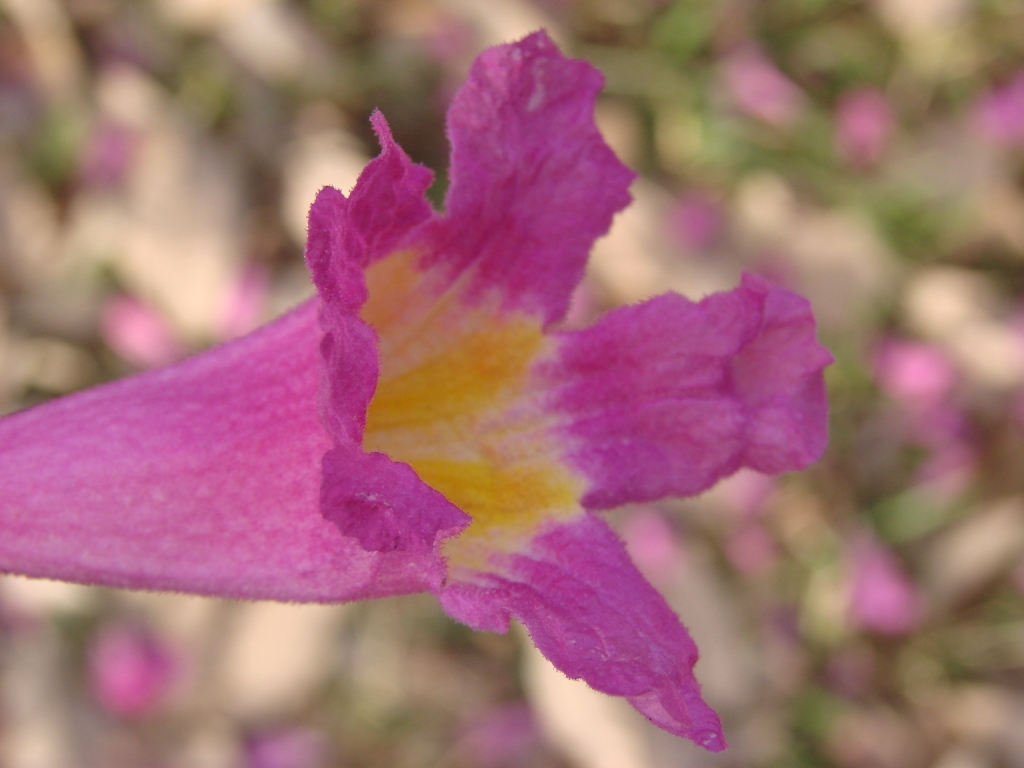 Tabebuia impetiginosa (Pink Ipê or Pink Lapacho) -BIGNONIACEAE Brasília - Distrito Federal - Brasil.